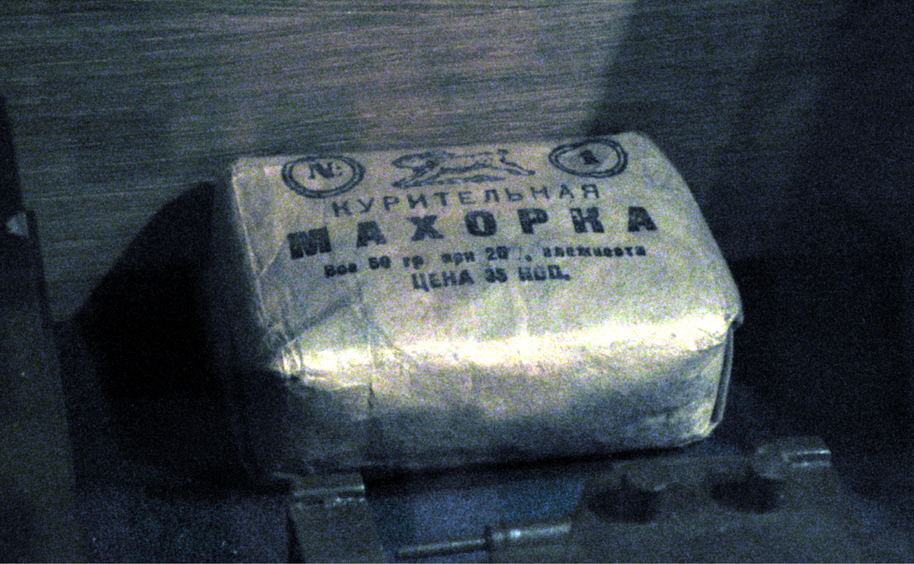 Пачка махорки времен Великой отечественной войны. Экспозиция Бункера сталина